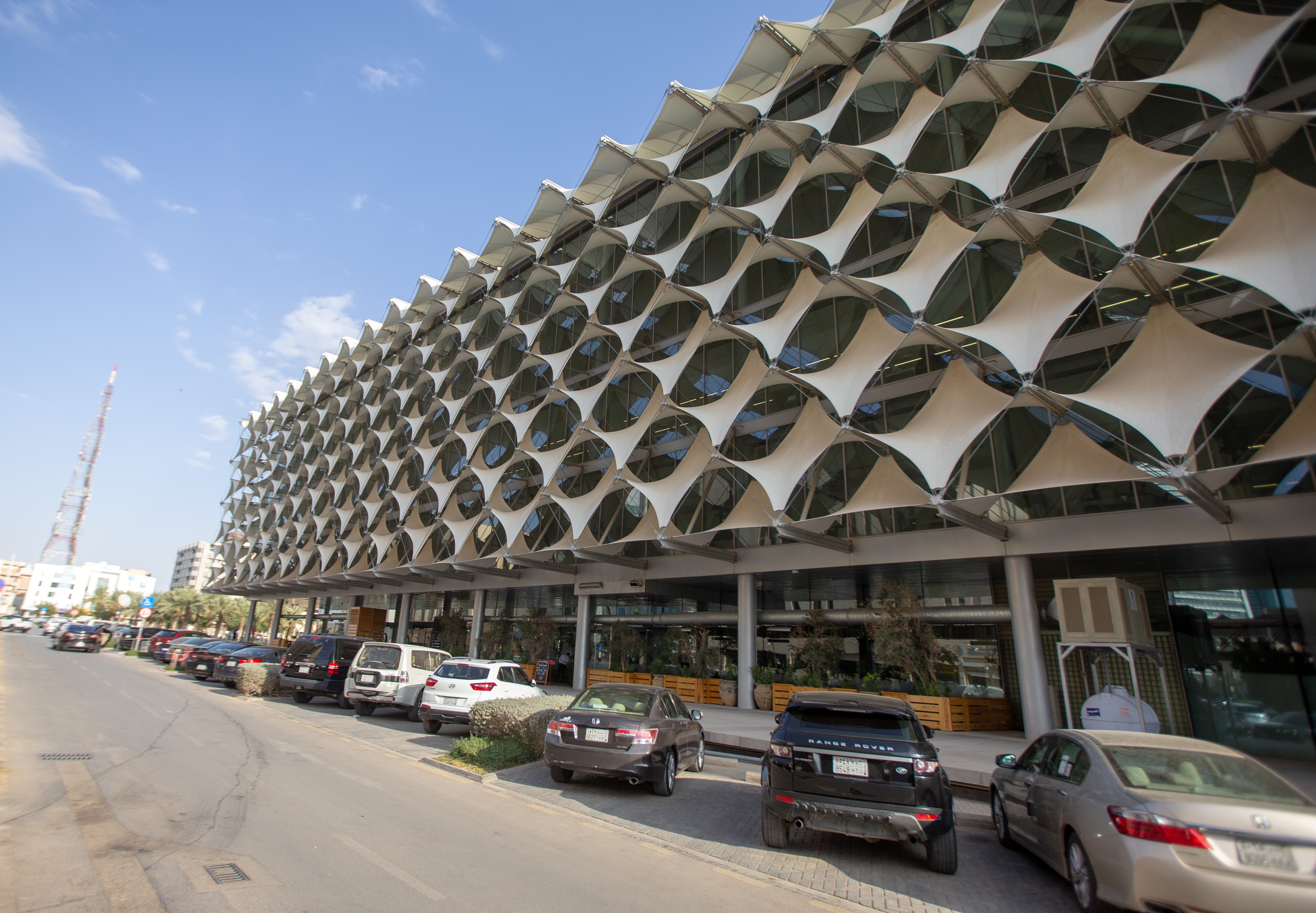 مكتبة الملك فهد الوطنية بالرياض